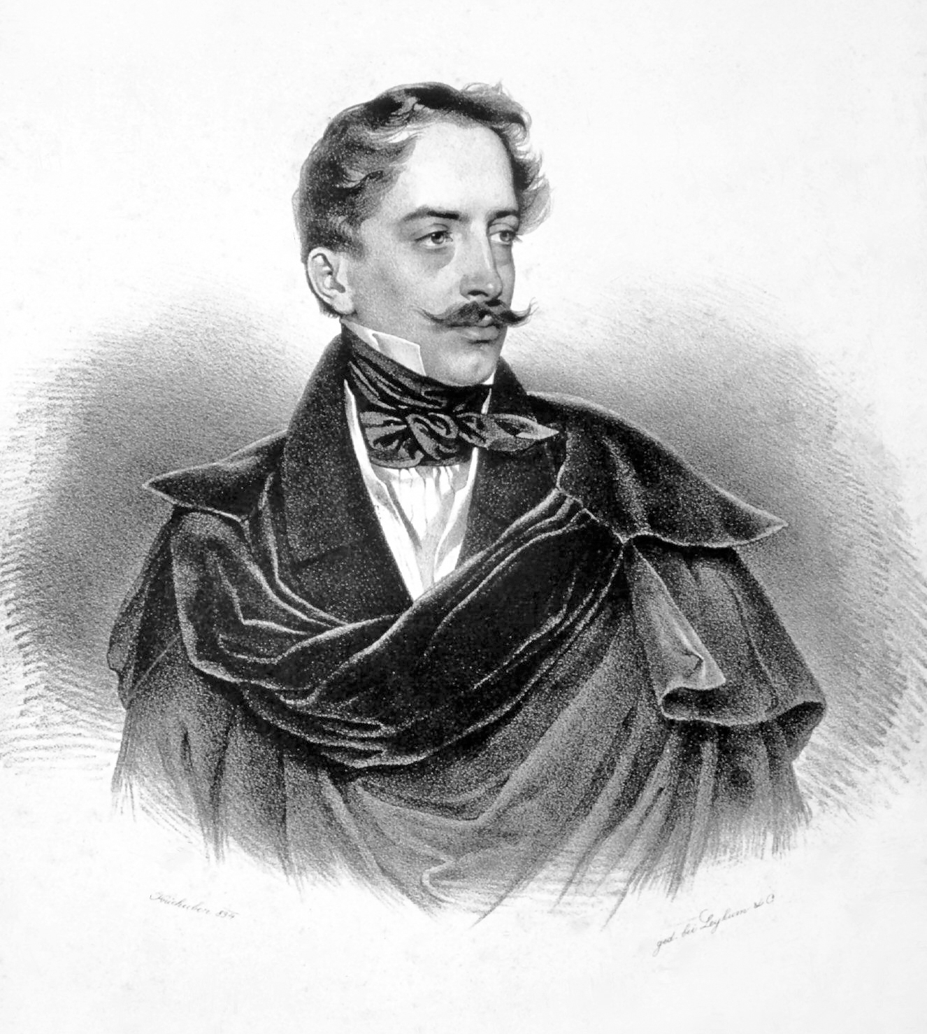 August Freiherr von Stillfried-Ratenicz (1806-1897), österreichischer Offizier (Feldmarschalleutnant)